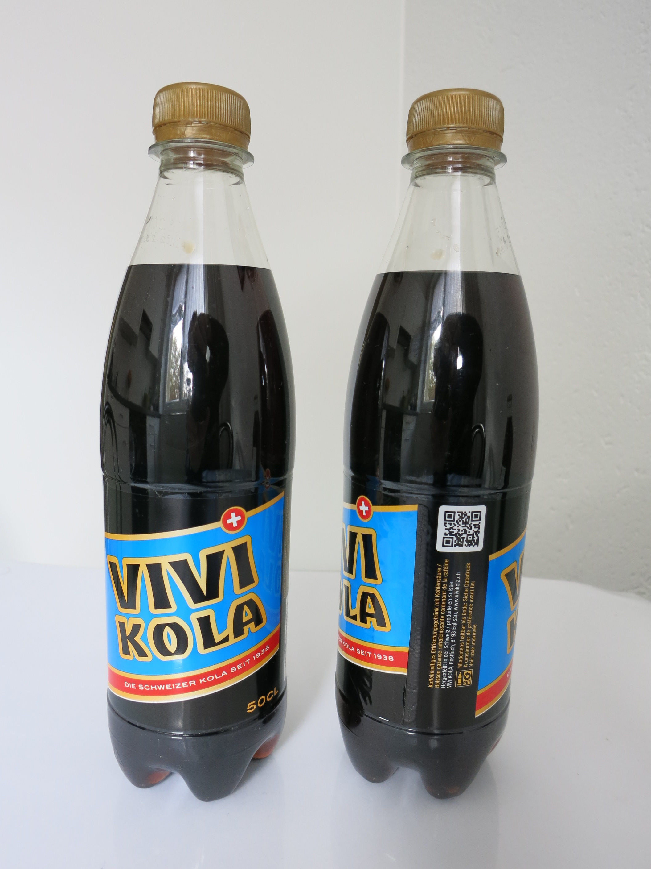 Vivi Kola, Eglisau, Schweiz